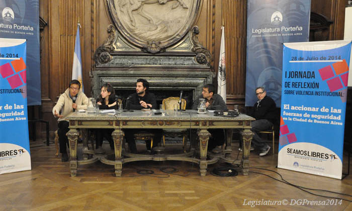 Jornada de Reflexión sobre Violencia Institucional en la Ciudad llevada a cabo durante el lunes 28 de julio de 2014 en el Salón San Martín de la Legislatura porteña con la presencia de legisladores, familiares de víctimas de violencia institucional y representantes de organizaciones políticas y sociales.